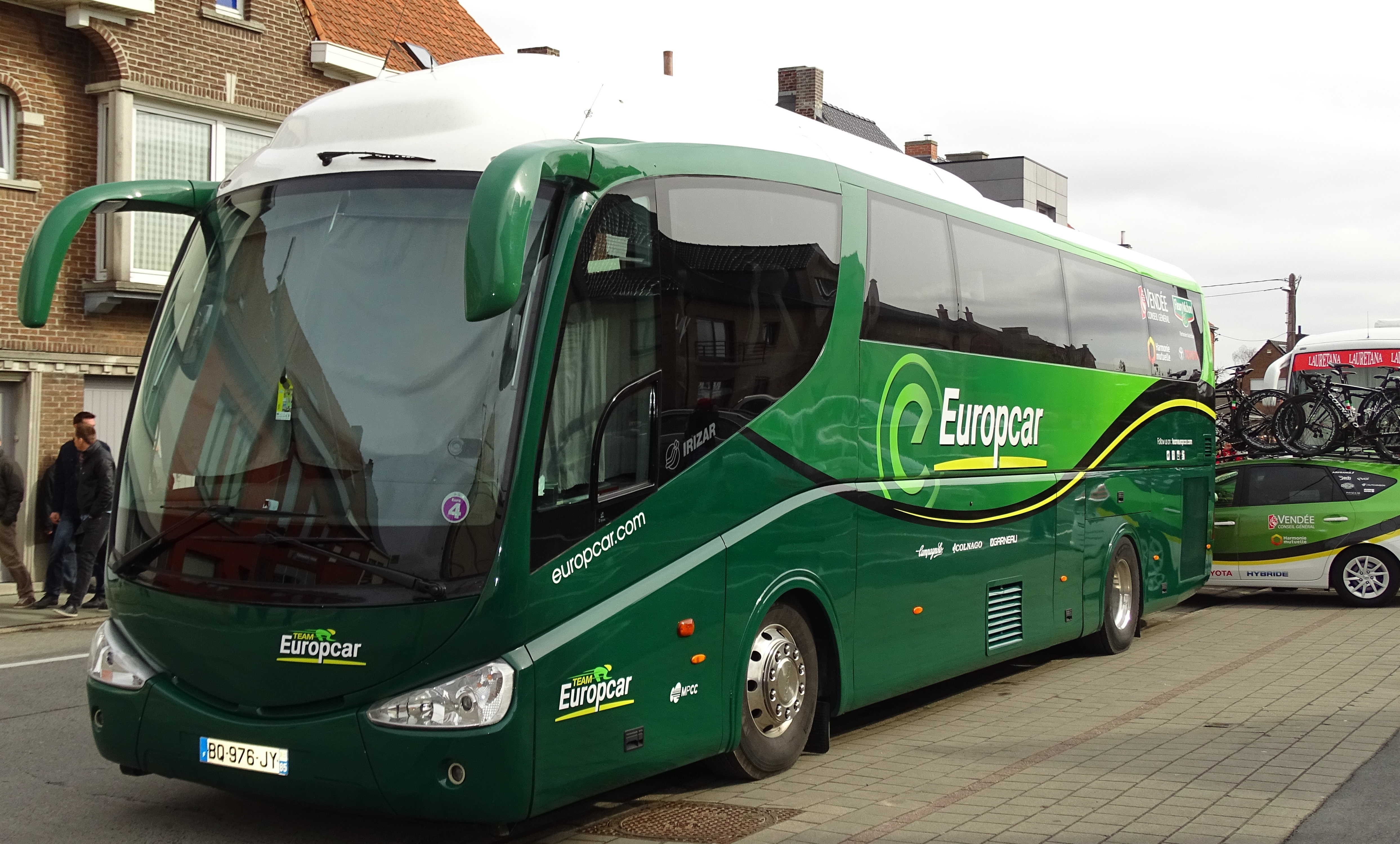 Reportage réalisé le vendredi 27 mars à l'occasion du départ et de l'arrivée du Grand Prix E3 2015 à Harelbeke, Belgique.